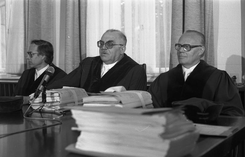 Das Bundesarbeitsgericht in Kassel fällt Grundsatzentscheidungen zur Aussperrung im Streit zwischen Gewerkschaften und Arbeitgebern.